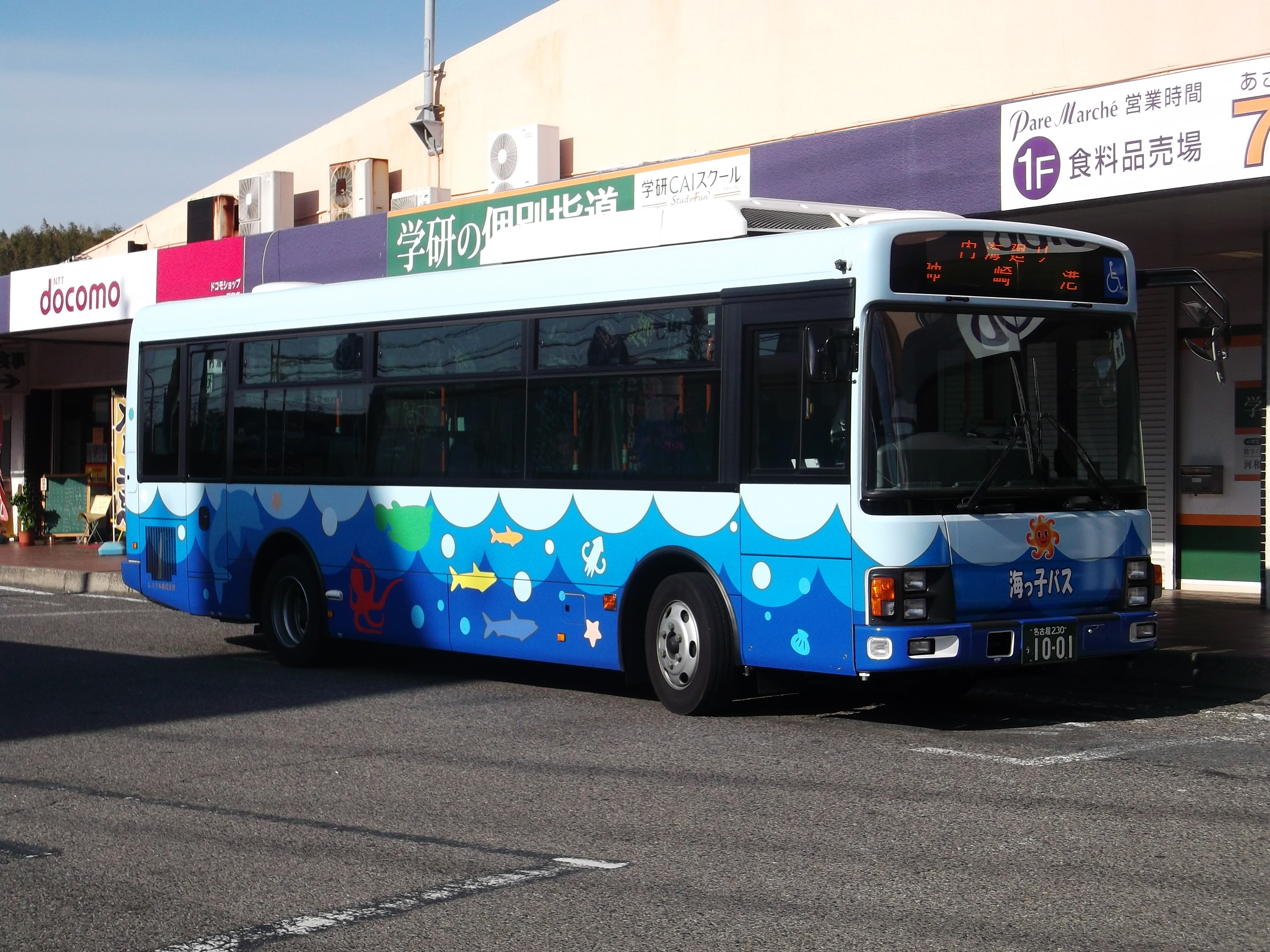 海っ子バス（河和駅前にて）